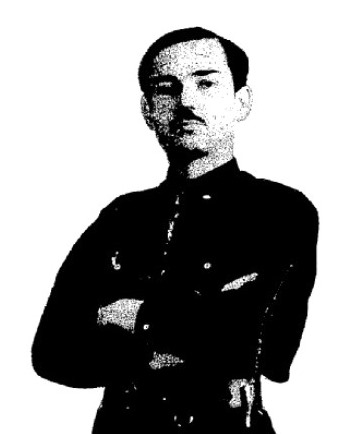 Henri Coston.